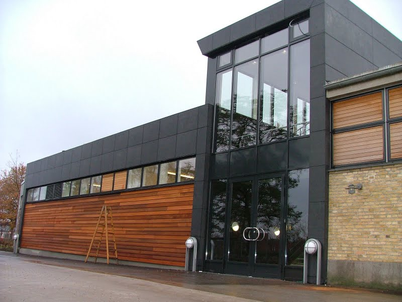 Jægersborg Boldklubs ny tilbygning